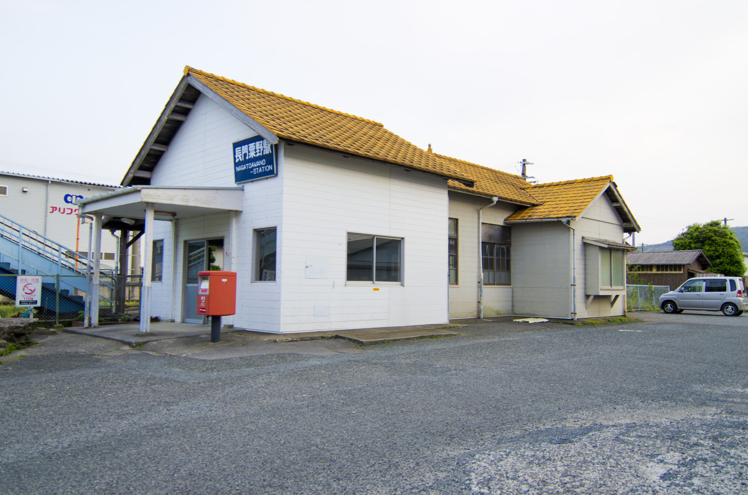 西日本旅客鉄道株式会社山陰本線長門粟野駅